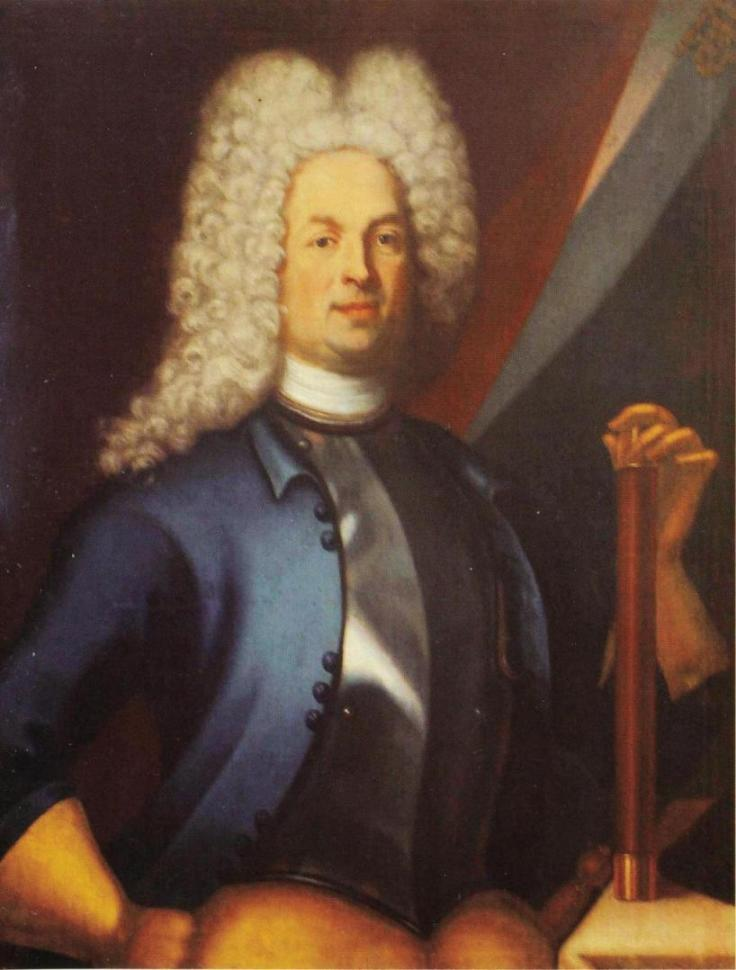 Pohjanmaan rykmentin eversti, myöhempi kenraalimajuri Christer Henrik d'Albedyhll (1679–1750), Margareta Capsian maalaama muotokuva. Teos on Ängsön linnassa Västeråsissa.